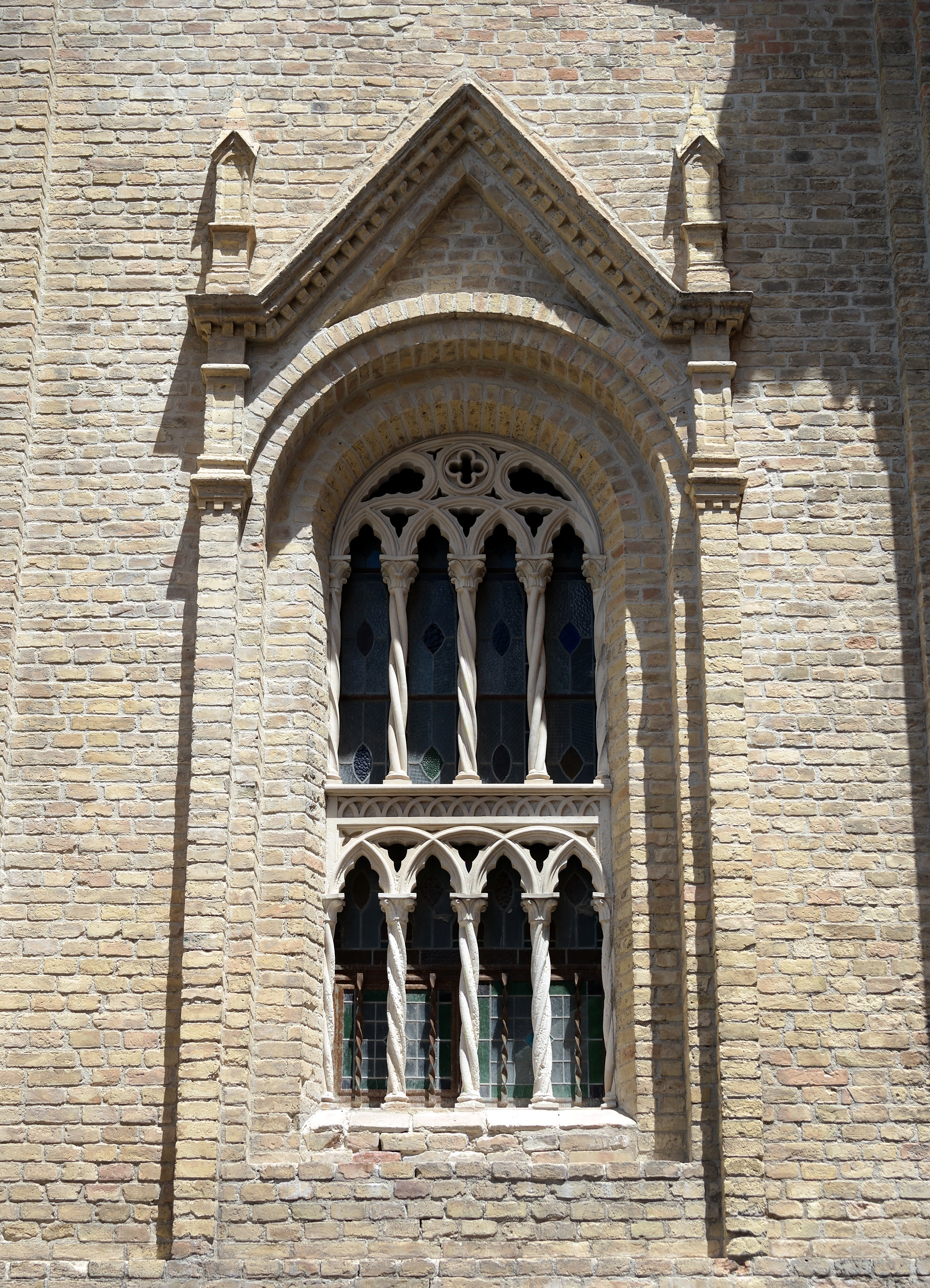 Quadrifore sulla facciata della Chiesa del Sacro Cuore a Pescara